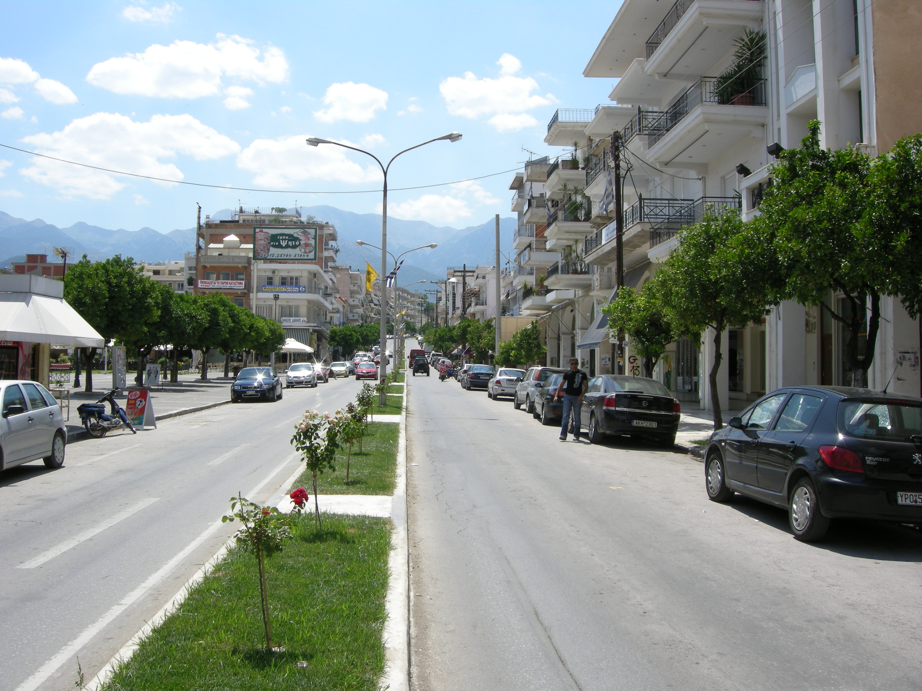 Modern sparti